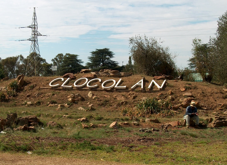 Clocolan is 'n dorpie in die Oos-Vrystaat en is in 1907 gestig